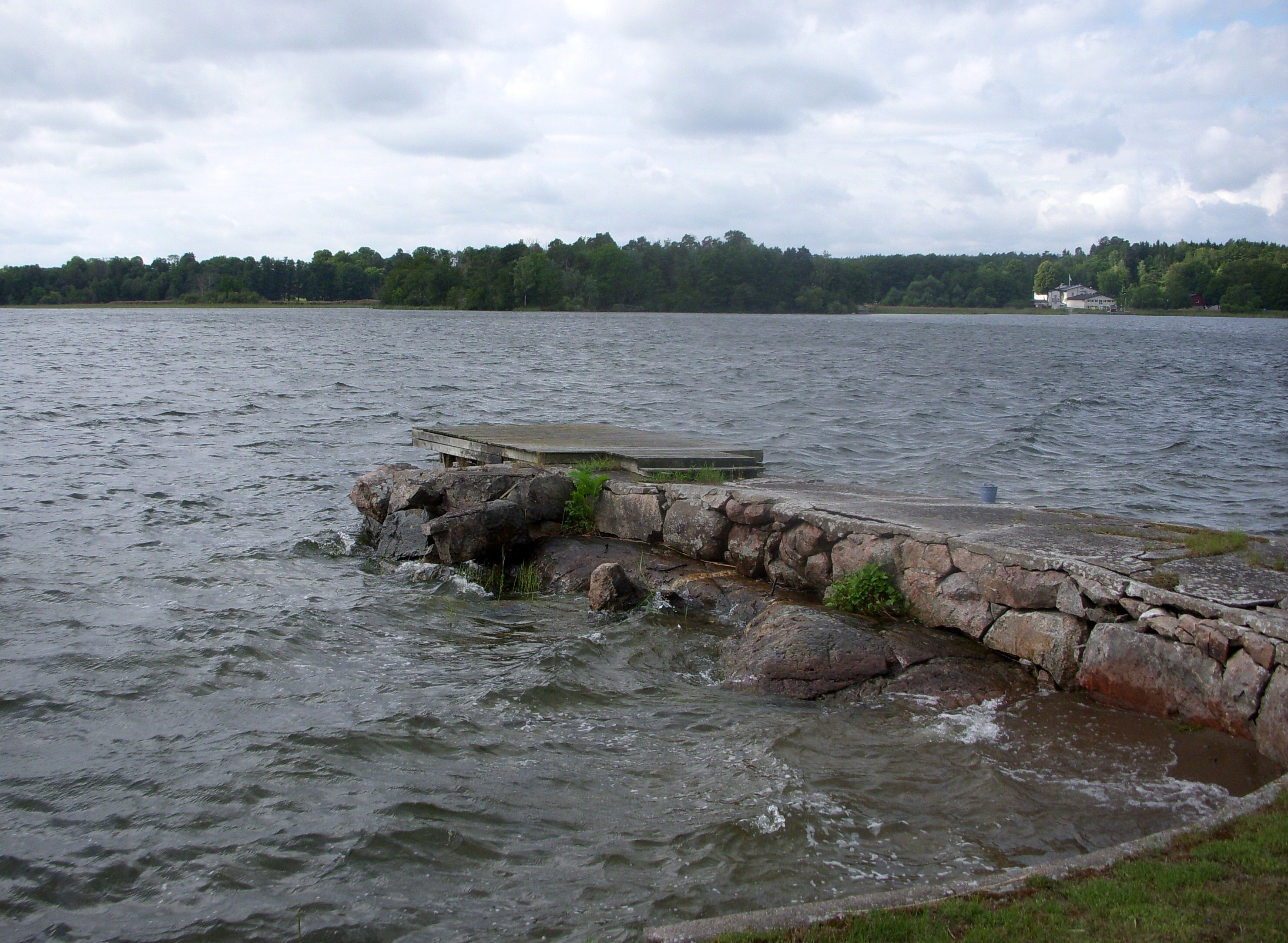 Äldre brygga vid Tyska Botten vid Mälaren i Bromma, Stockholm (RAÄ-nummer Bromma 153:1)